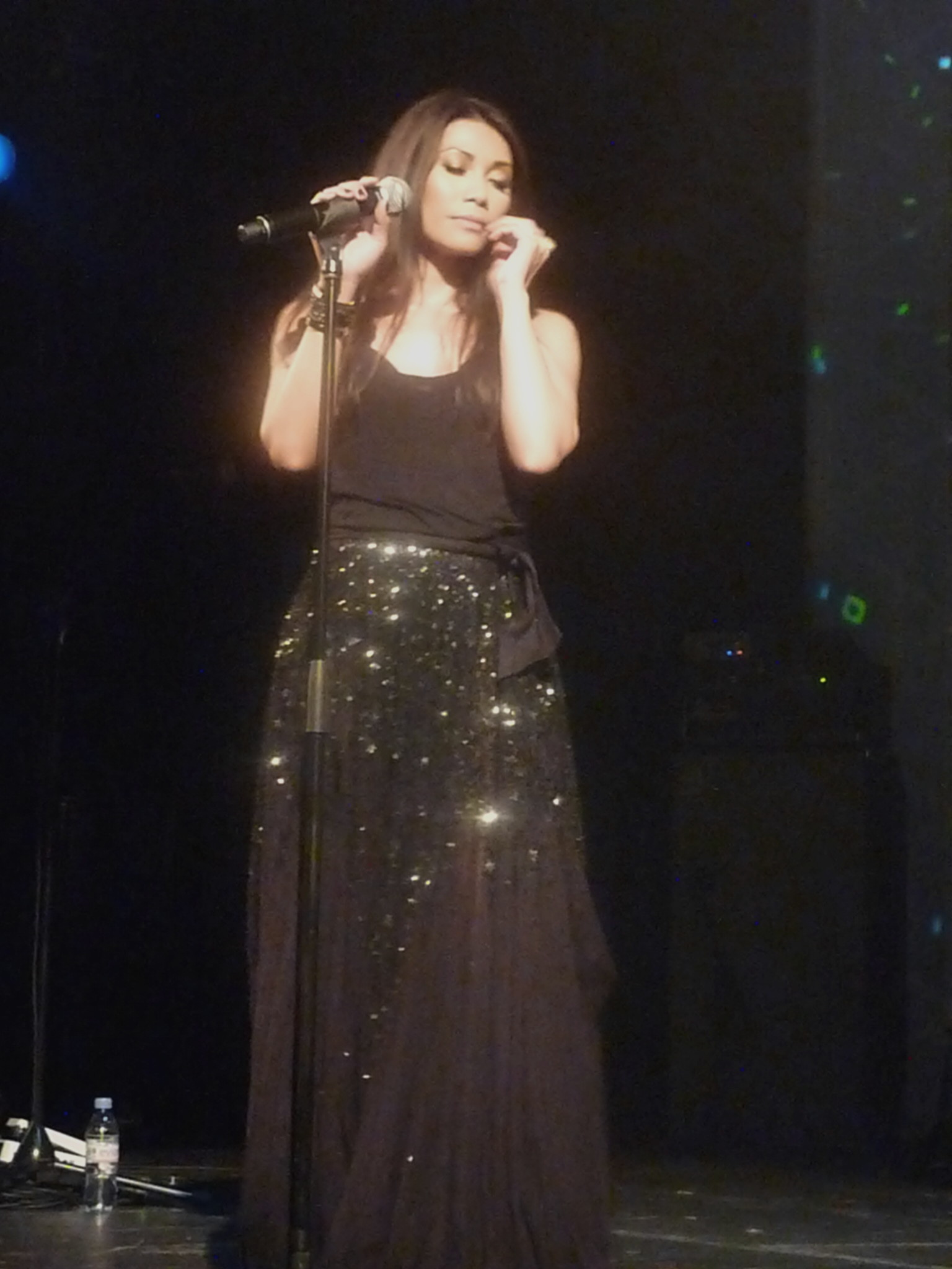 La chanteuse Anggun en concert au Trianon à paris en juin 2012